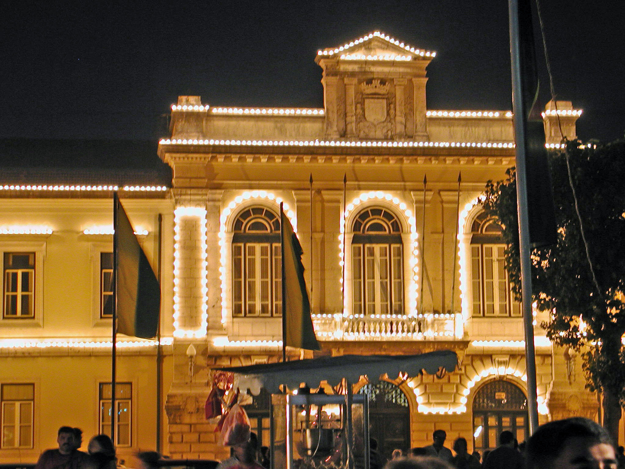 Edifício dos Paços do Concelho, Figueira da Foz, Portugal.